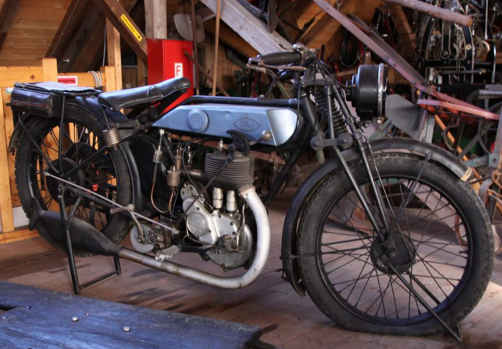 Motorrad der Marke Sieg